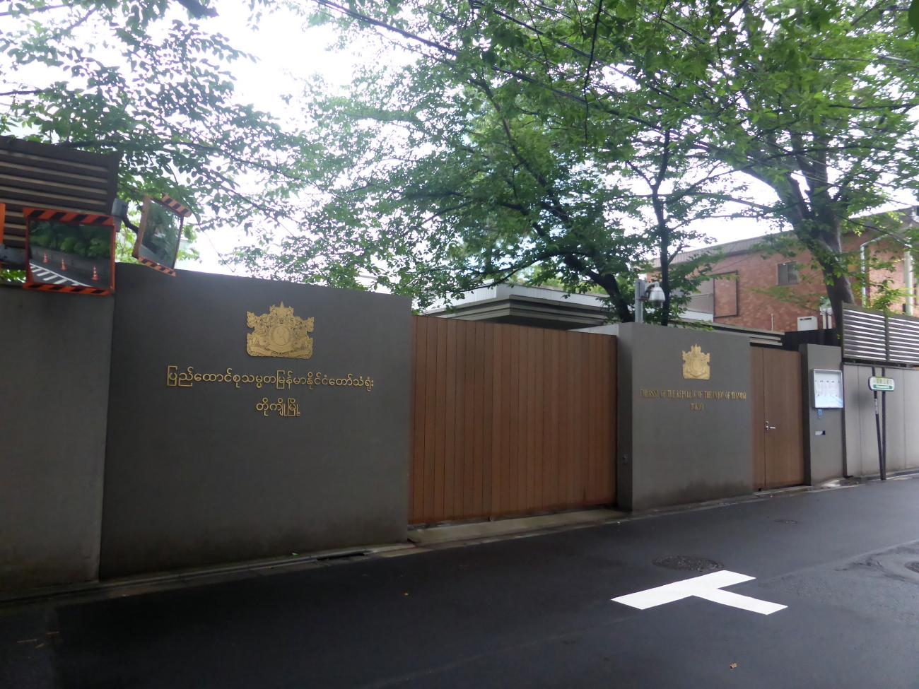 ミャンマー大使館正門